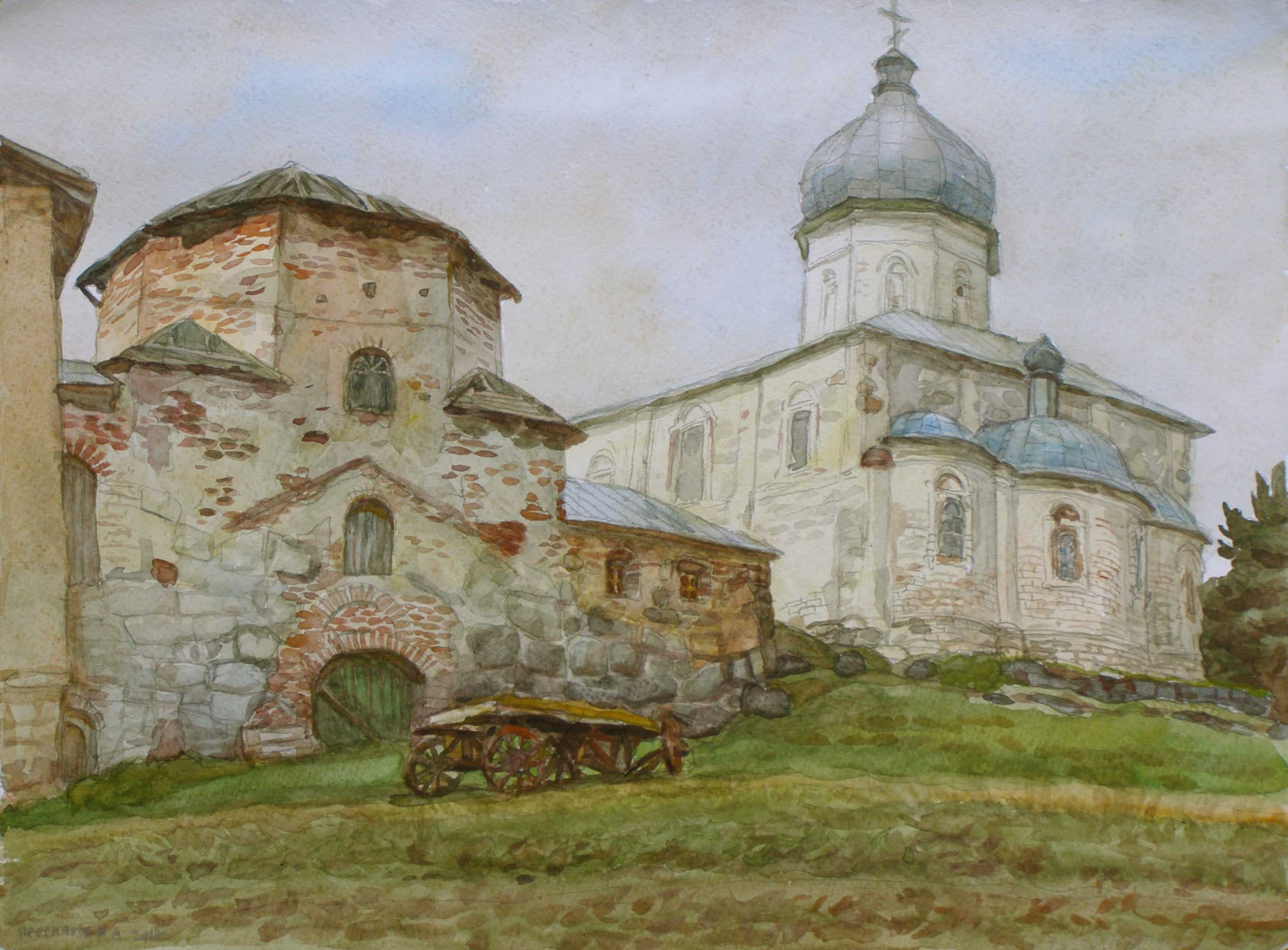 Крестовоздвиженский собор Крестного монастыря на Кий острове в Белом море. Состояние на 2010г. - действующий. На переднем плане частично разобранная колокольня с воротами. (Пресняков, Максимильян Анатольевич)